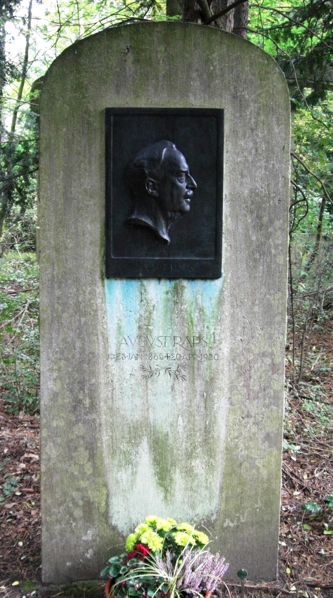 Grab des Physikers August Raps (1865-1920) auf dem Südwestkirchhof in Stahnsdorf